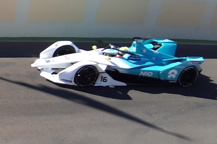 Oliver Turvey beim Marrakesch E-Prix 2019